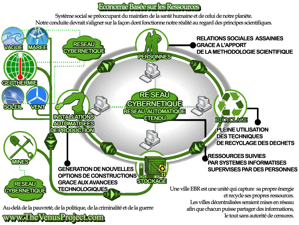 Schéma exposant une démonstration simplifiée du fonctionnement d'un Modèle Économique Basé sur les Ressources (MEBR)